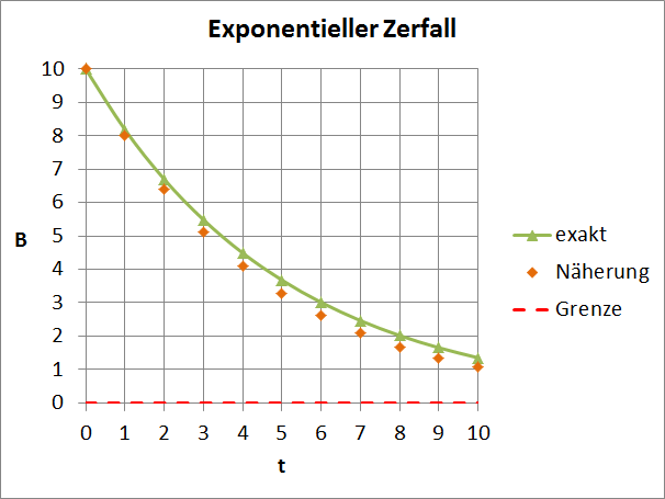 Dieser Graph zeigt exponentiellen Zerfall.